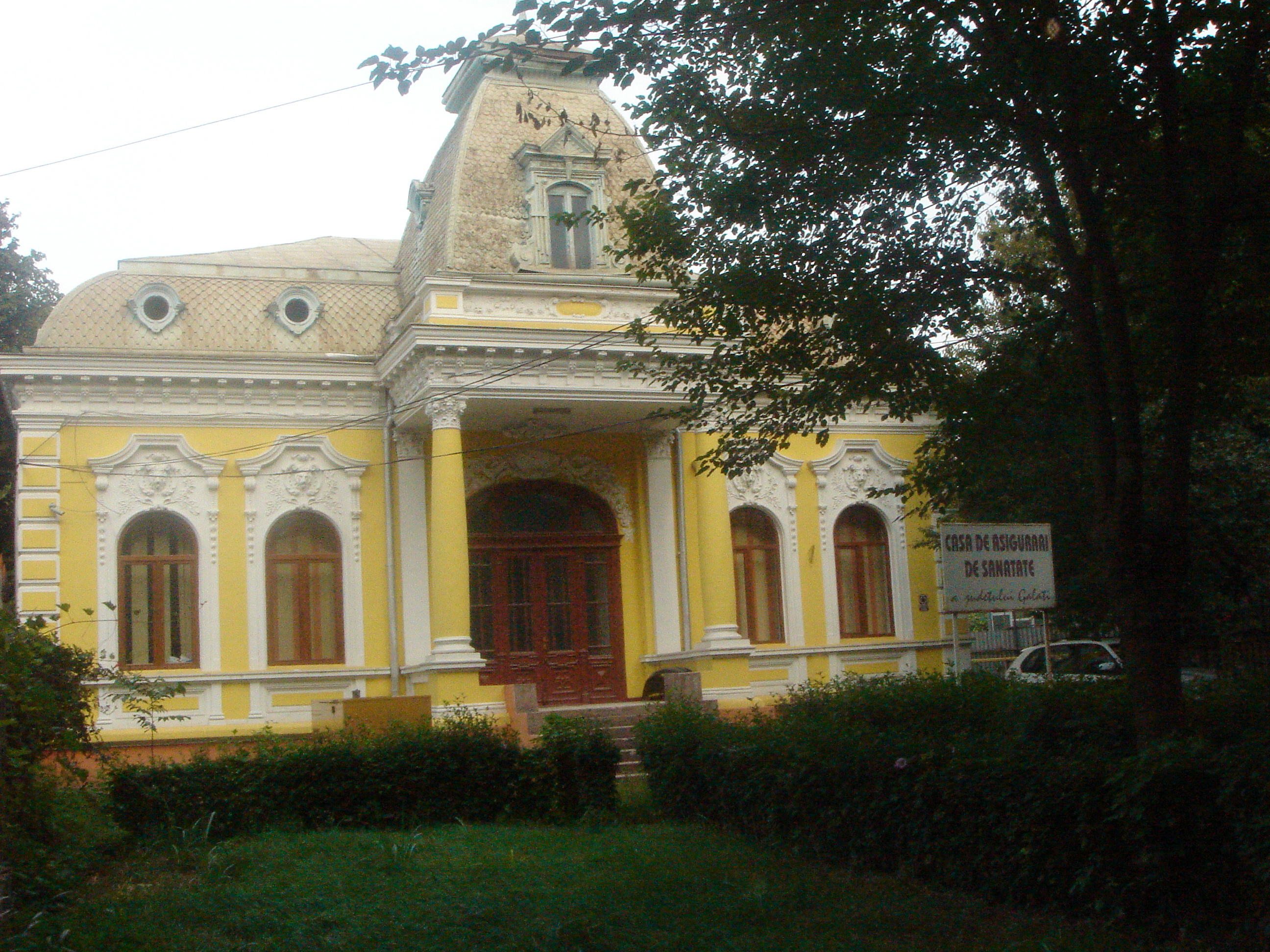 Este o anexa a Casei de Asigurari de Sanatate.